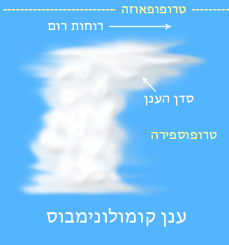 ענן הקומולונימבוס מתנשא משכבת הטרופוספירה עד לשכבת הטרופופאוזה, שם, האוויר יציב מכדי להכיל עננים, הענן מפסיק לטפס ונוצר הסדן. באזור זה נושבות רוחות הרום אשר מניעות את הסדן כך שהחלק העליון של הענן "עוקף" את חלקו התחתון.